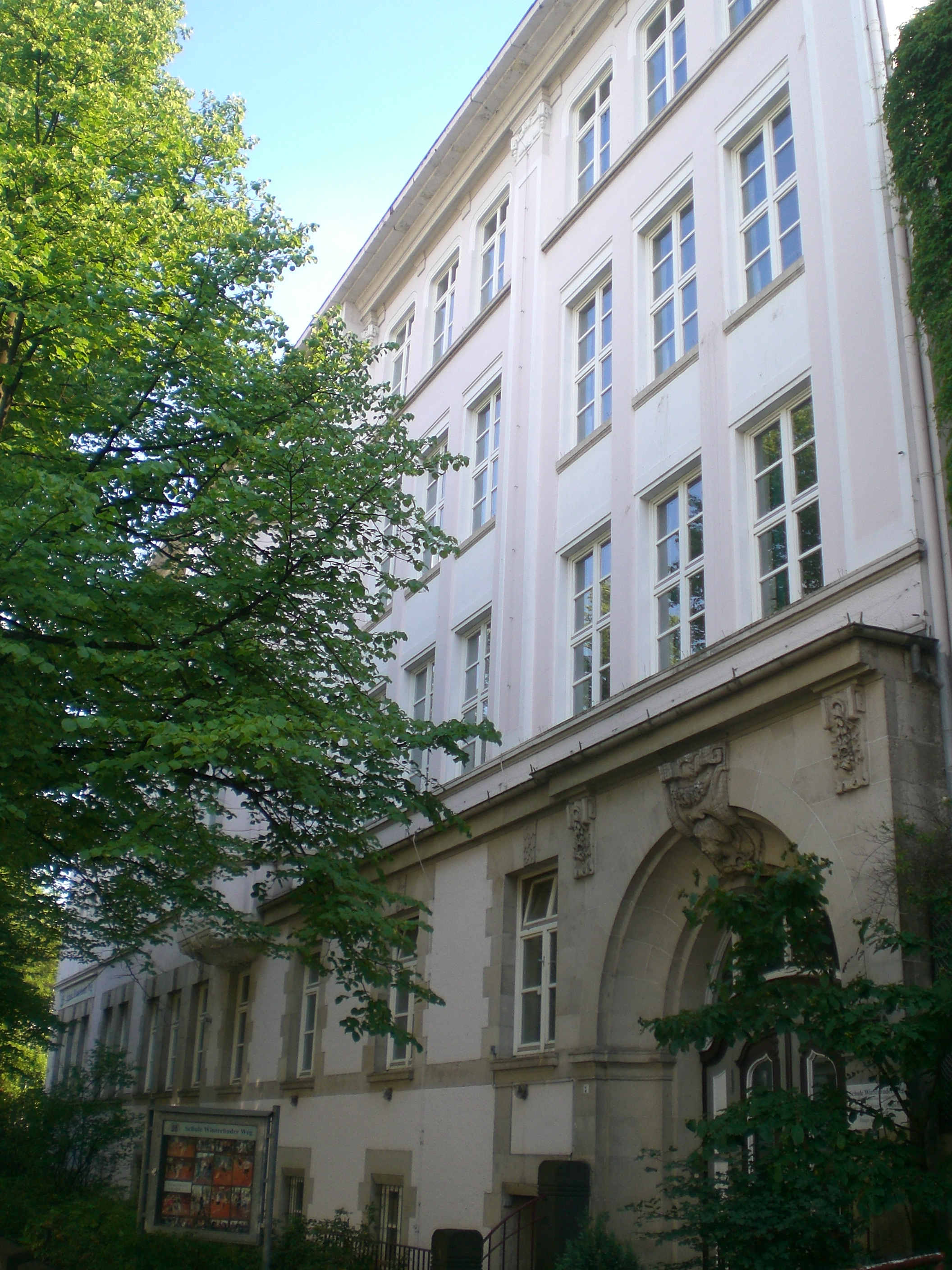 Ilse-Löwenstein-Schule, Humboldtstraße 89, Hamburg-Barmbek-Süd This is a photograph of an architectural monument.